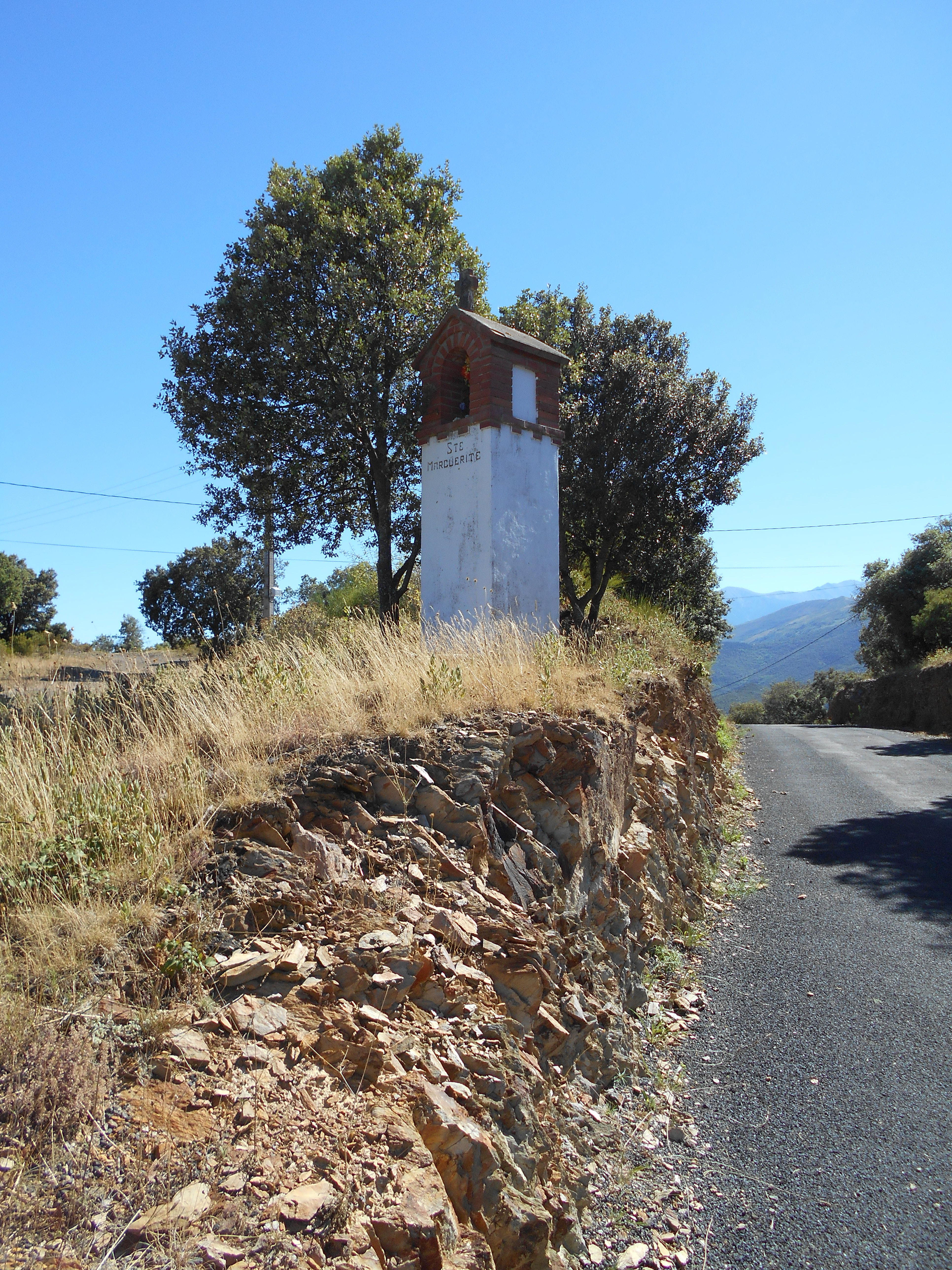 Oratori de Santa Margarida